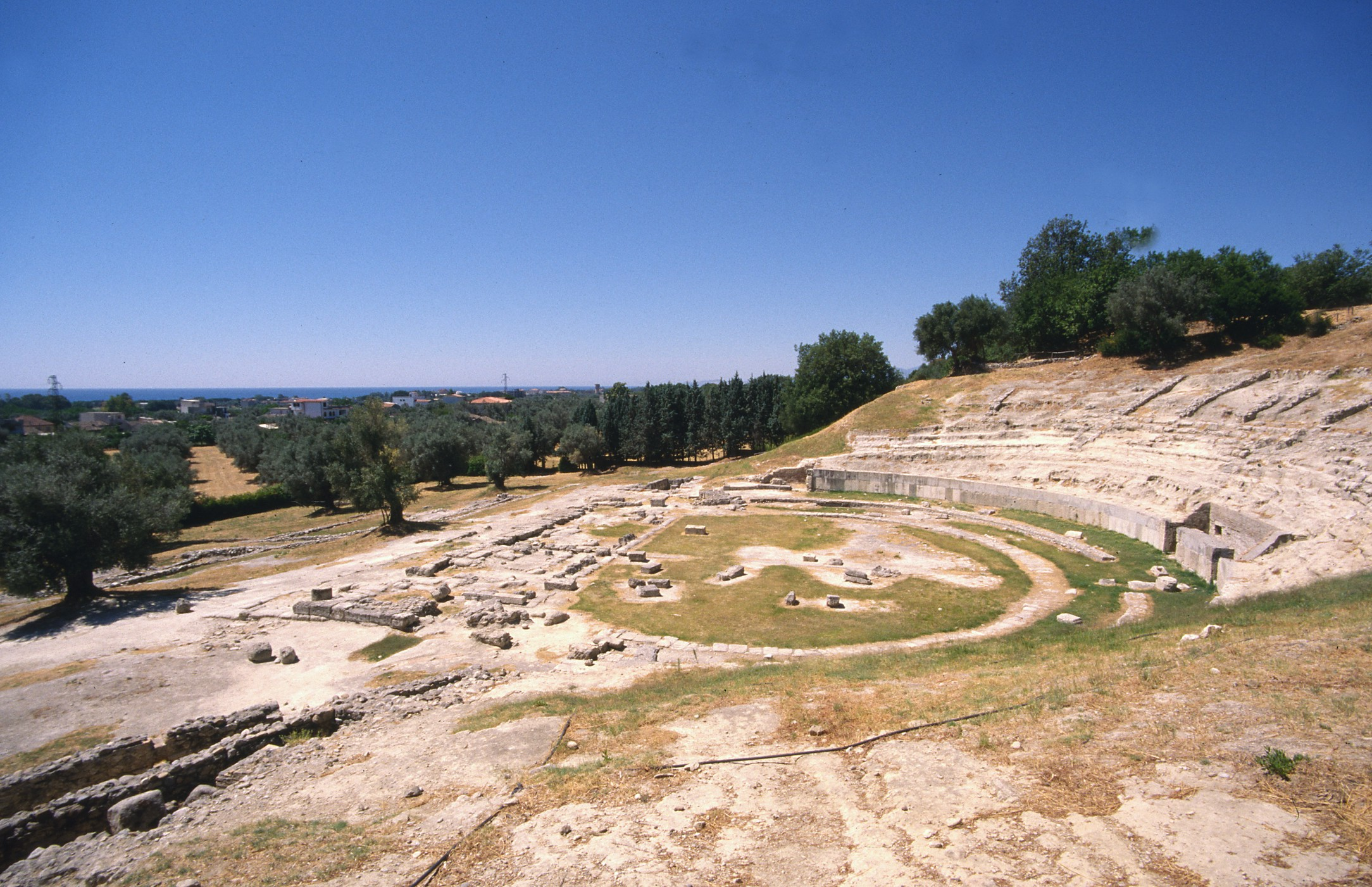 Locri Epizefiri, il teatro greco romano nel 1996.